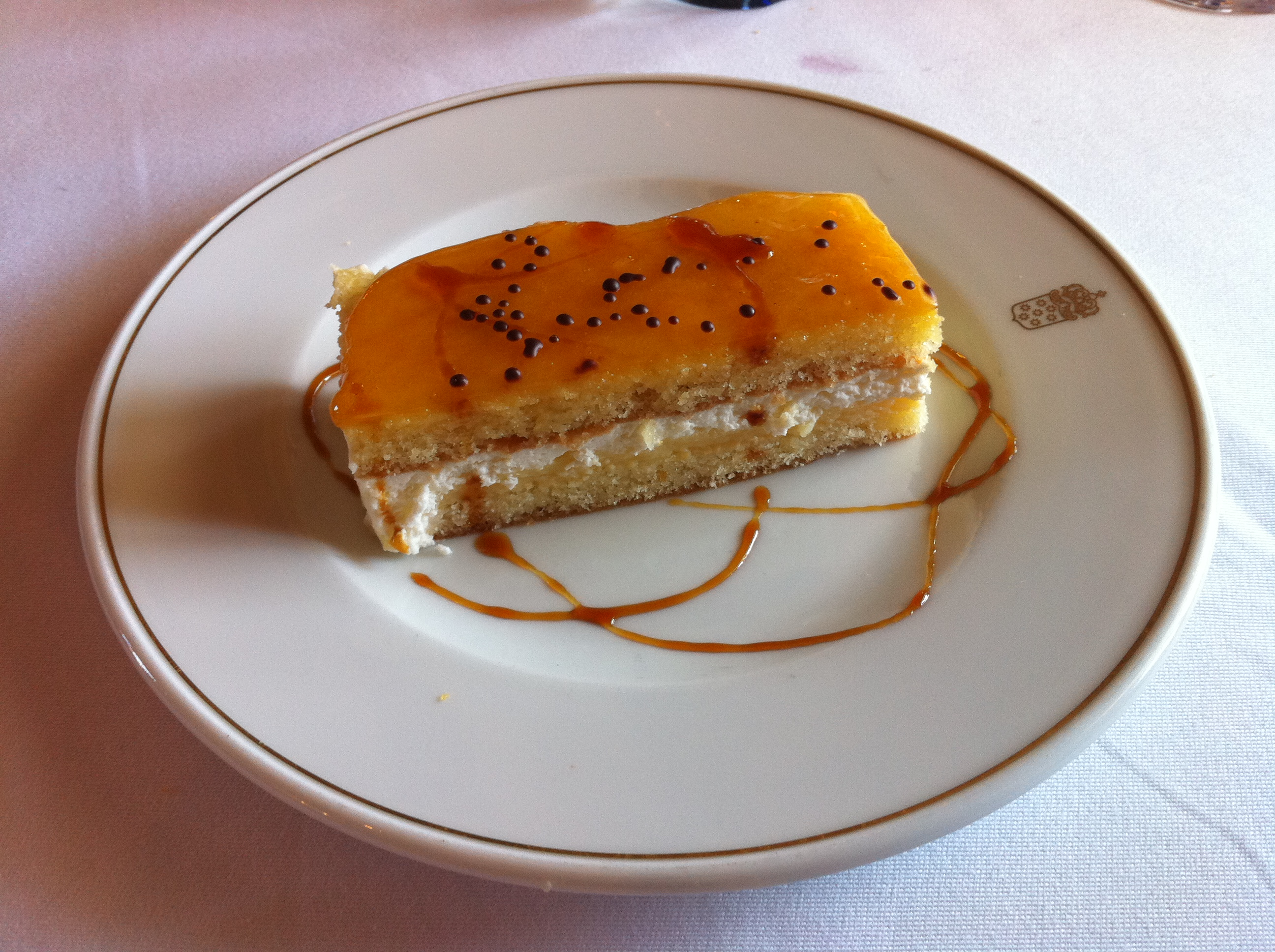 Ponche segoviano